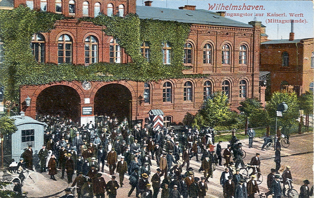 Postkarte, undatiert ( ca.1914 ). Beschriftung: "Wilhelmshaven - Eingangstor zur Kaiserlichen Werft ( Mittagsstunde )".